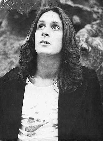 Nito Mestre, de Sui Generis.